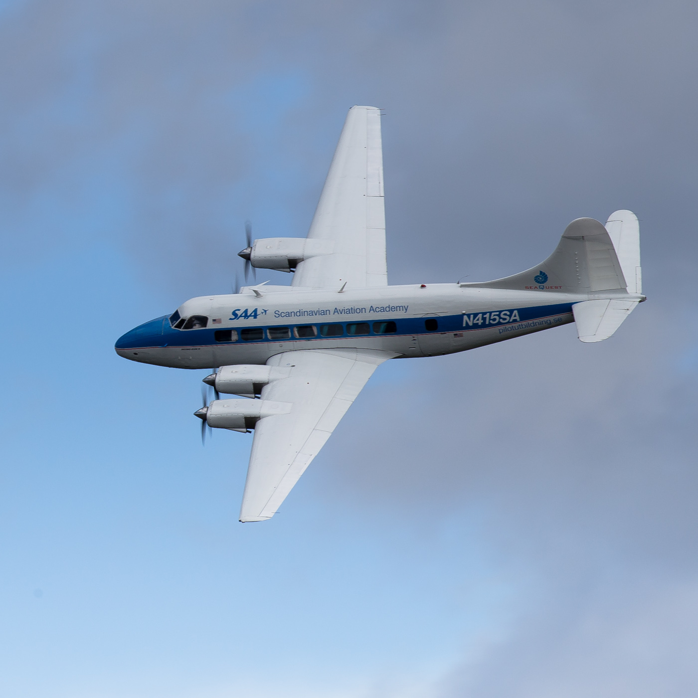 De Havilland DH-114 Heron-1674